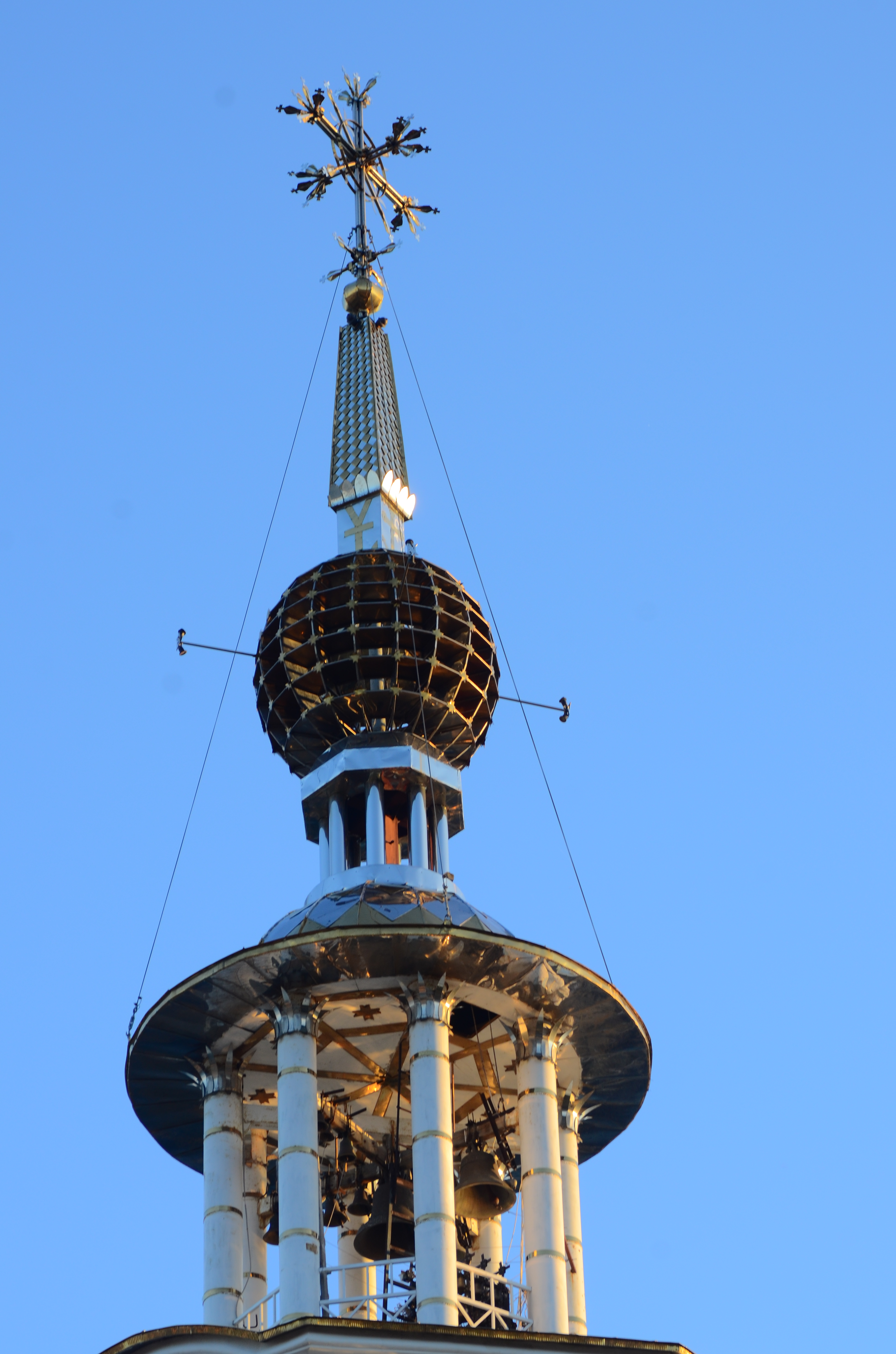 Крым.